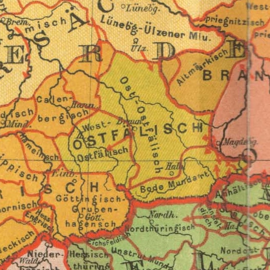 Ostfälischer Dialektraum Brockhaus 1894